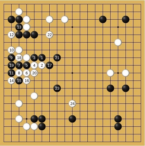 31-54手 219手完黒中押し勝ち